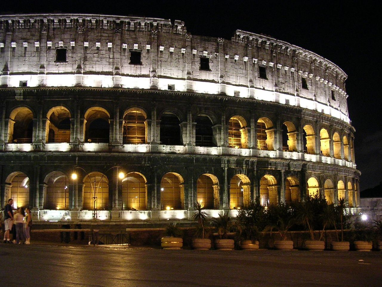 Colosseo, Roma, Italia